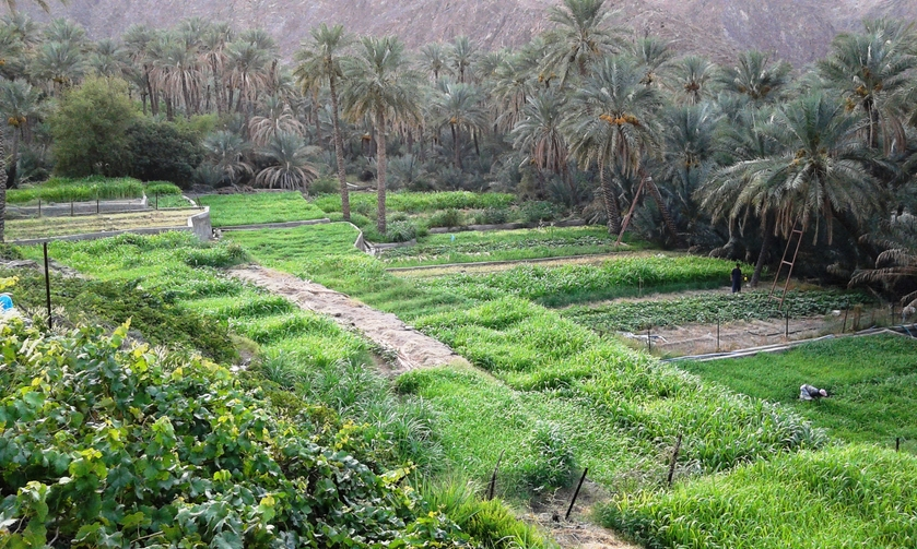 مزارع الحامية بلدة الوقبة بشمال ولاية ينقل سلطنة عمان